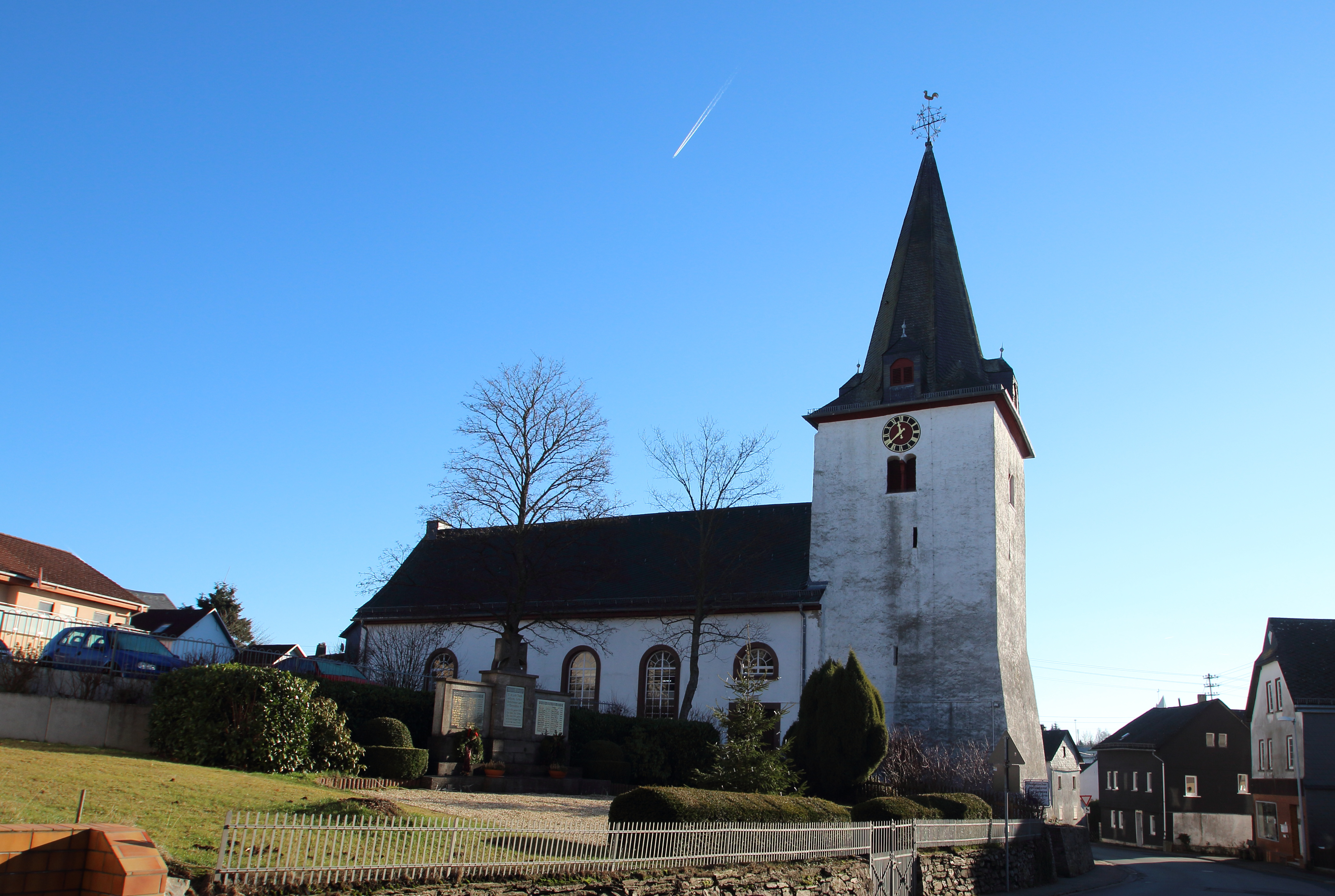 Evangelische Kirche in Heidenrod-Kemel, ehemals St. Katharina Westturm aus dem 13. Jh., Schiff 1819 oder 1827, Chor um 1843 erneuert.